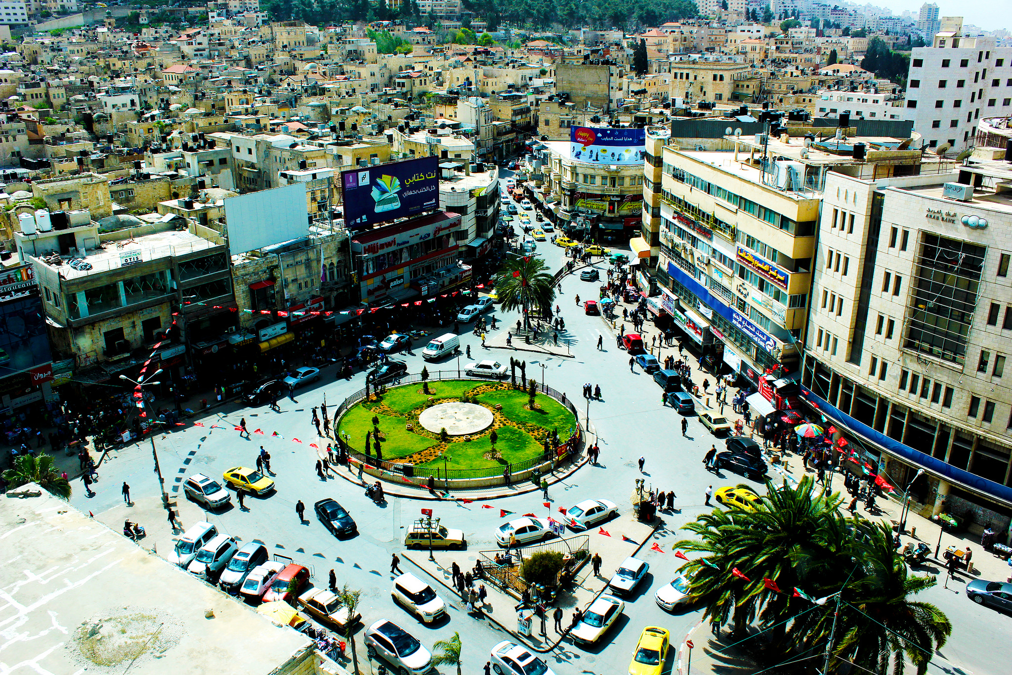 منطقة تعج بالحياة في مدينة نابلس وسطها بين ميدان الشهداء وميدان الحسين وعلى الطريق من طريق الاسكندرية